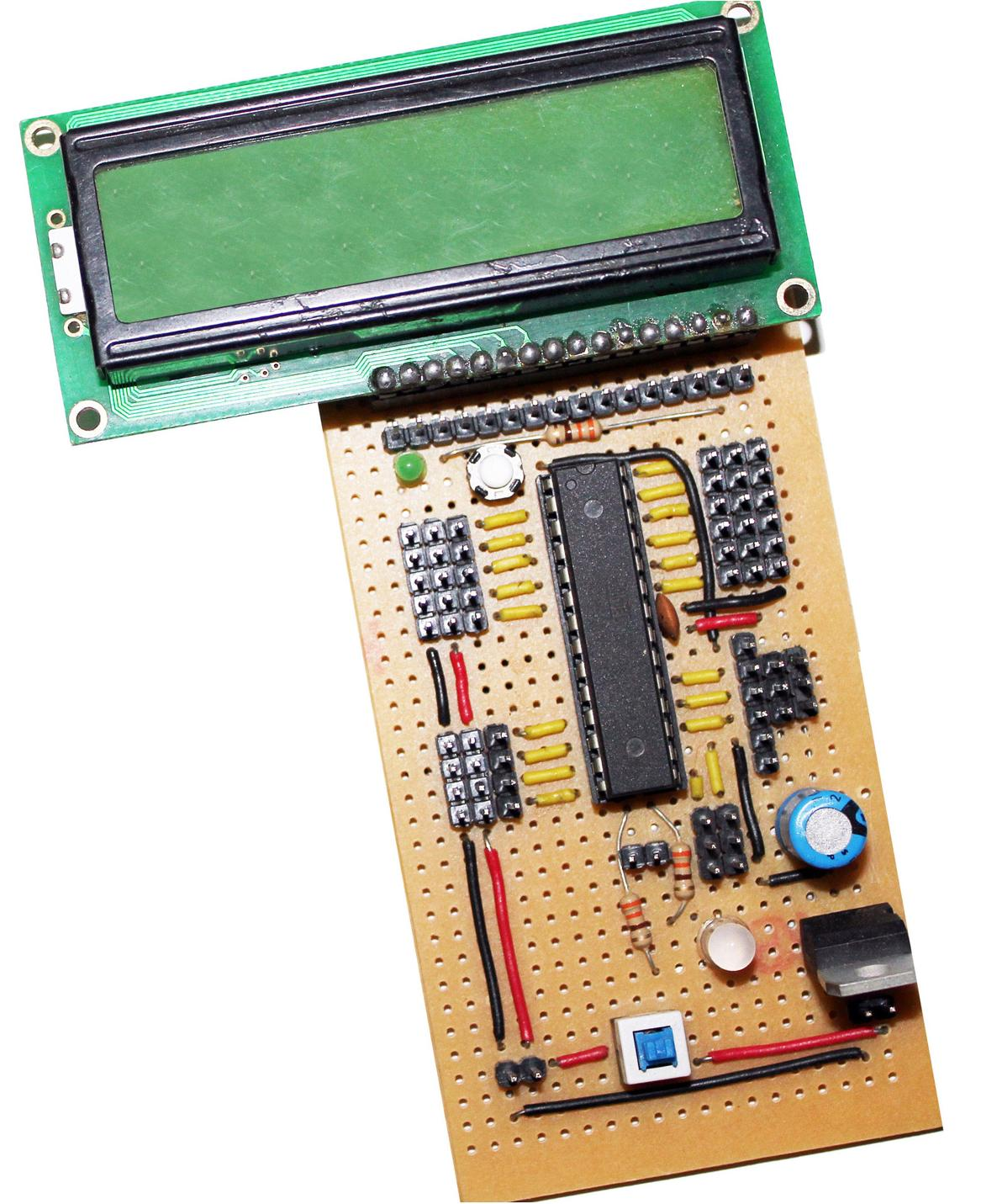 Atmega8 Development Board